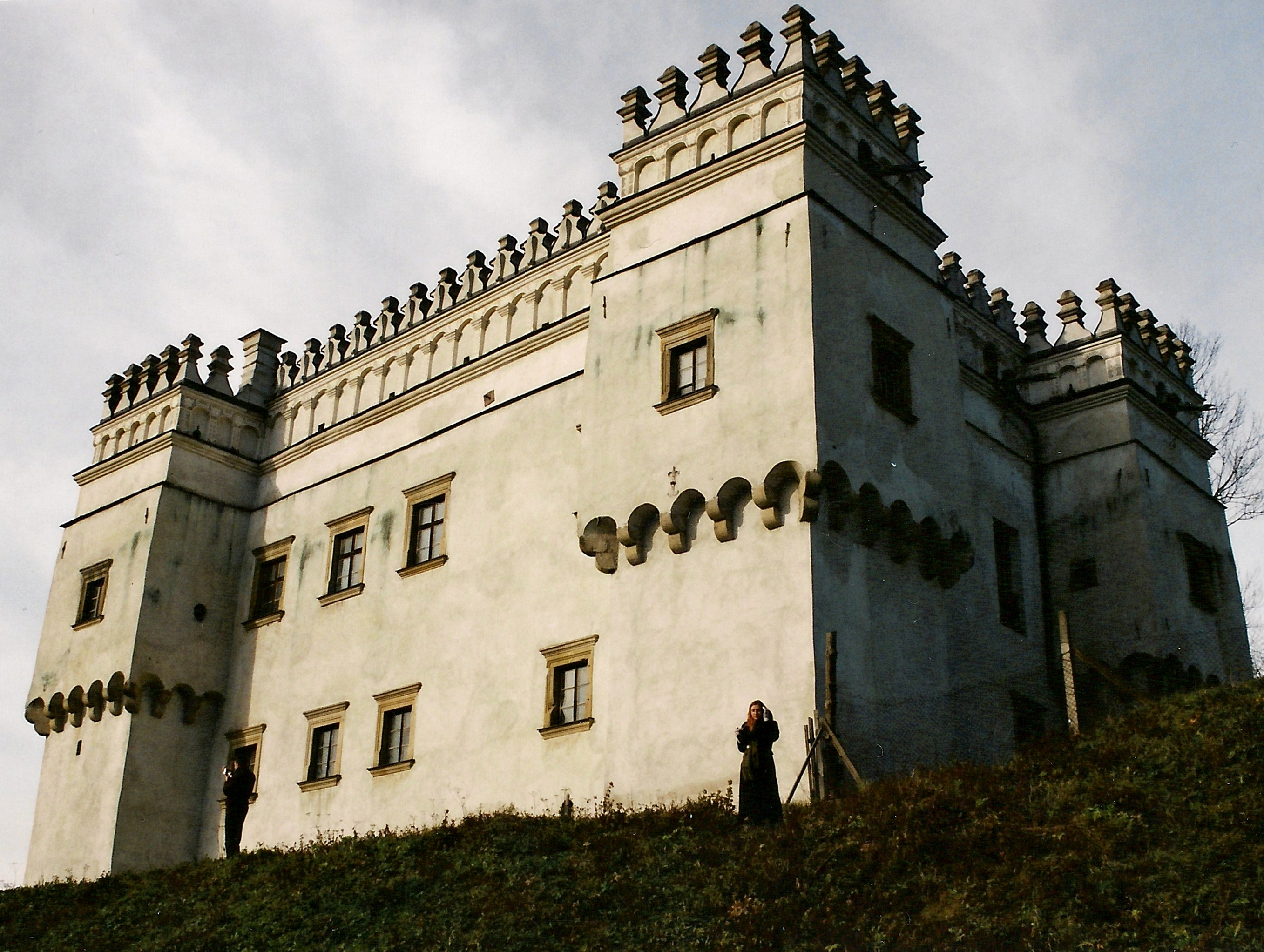 Dwór obronny w Szymbarku